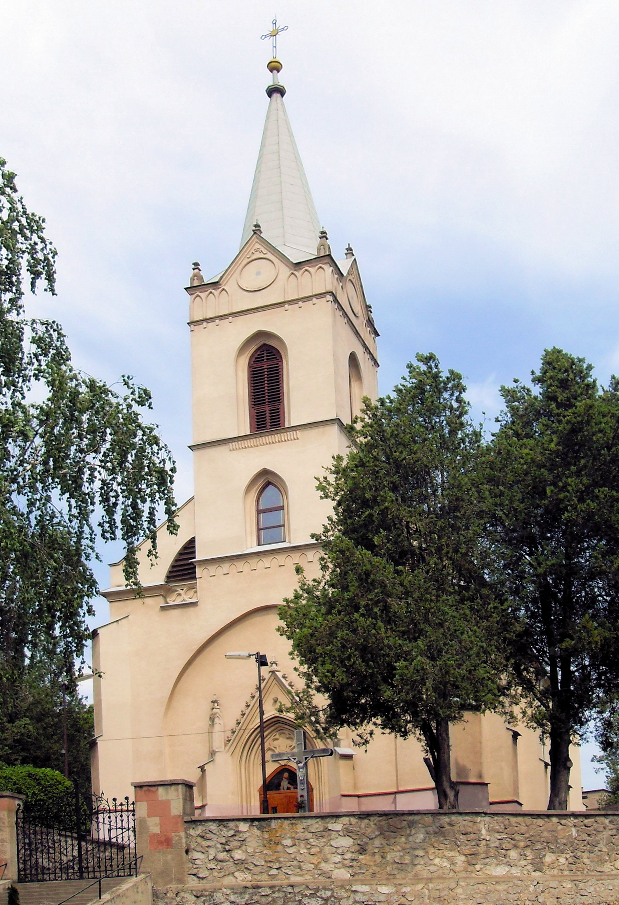 Mokrance, Rímskokatolícky kostol sv. Štefana Uhorského